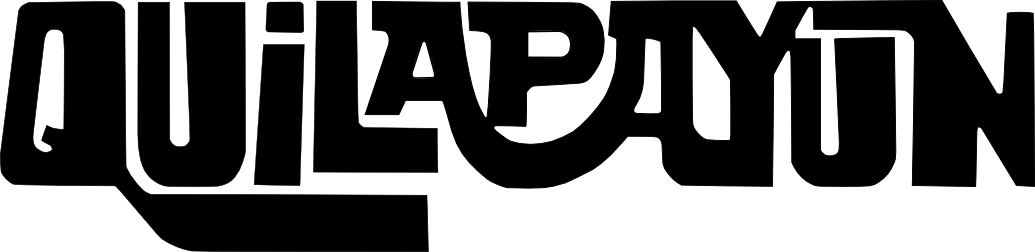 Logo de la banda Category:Quilapayún